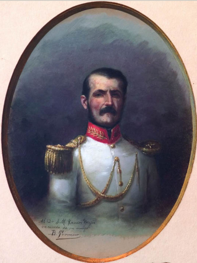 Retrato del coronel Matías Ramos Mejía Segurola (1809-1885)